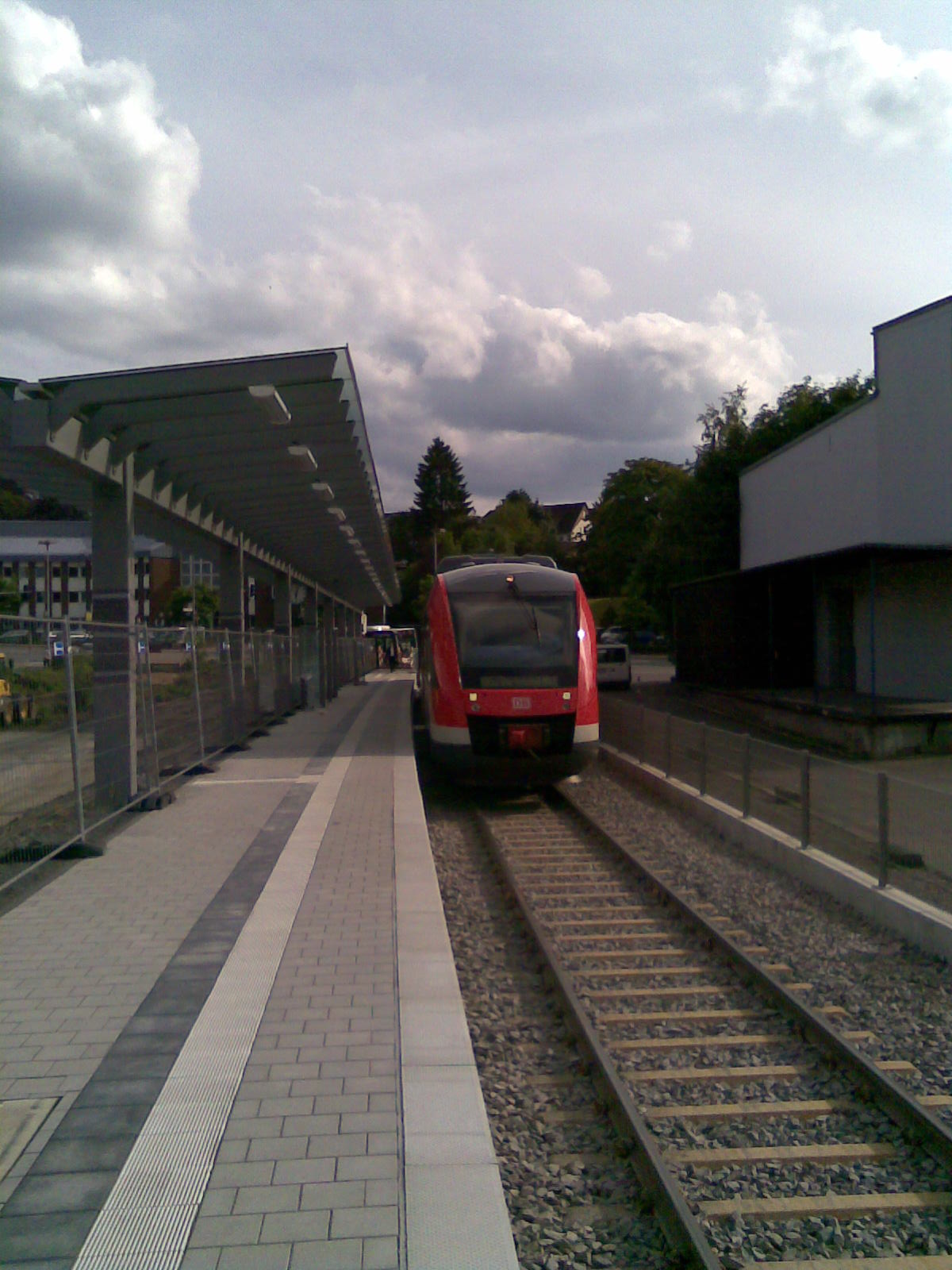 RB 29288 nach Dortmund am neuen Haltepunkt Lüdenscheid